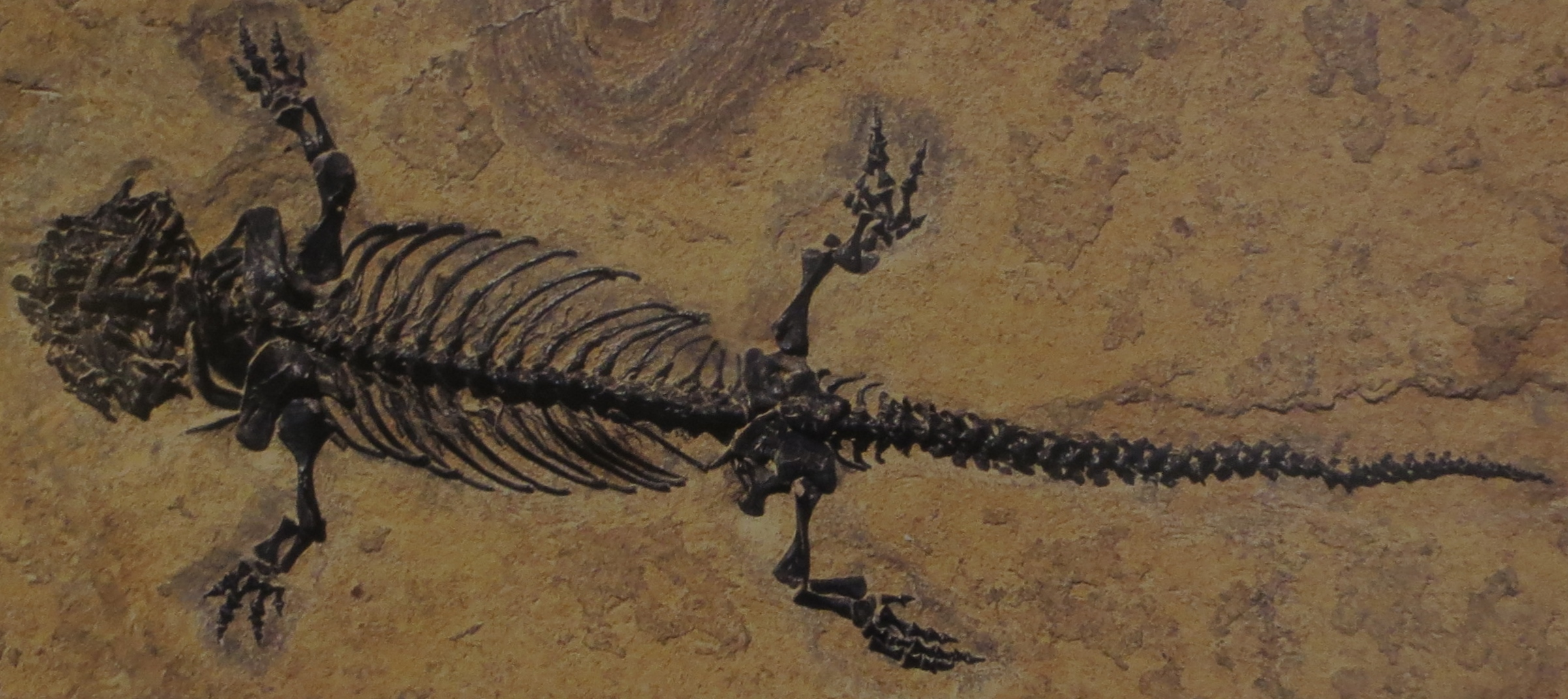 Fossil of Batropetes - Took the picture at Natural History Museum, Mainz